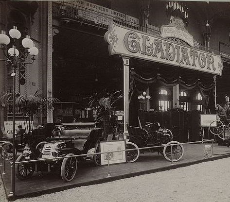 [Collection Jules Beau. Photographie sportive] T. 15. Année 1901 Jules Beau